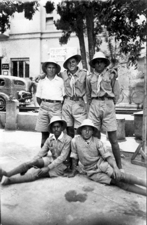 במכביה השניה . סניף המכבי הצעיר בכפר תבור : שמעון צפירה, חיים כהן, שולה פיקסמן, מיכה כהן, מרדכי קרניאל ; 1935 - כפר תבור